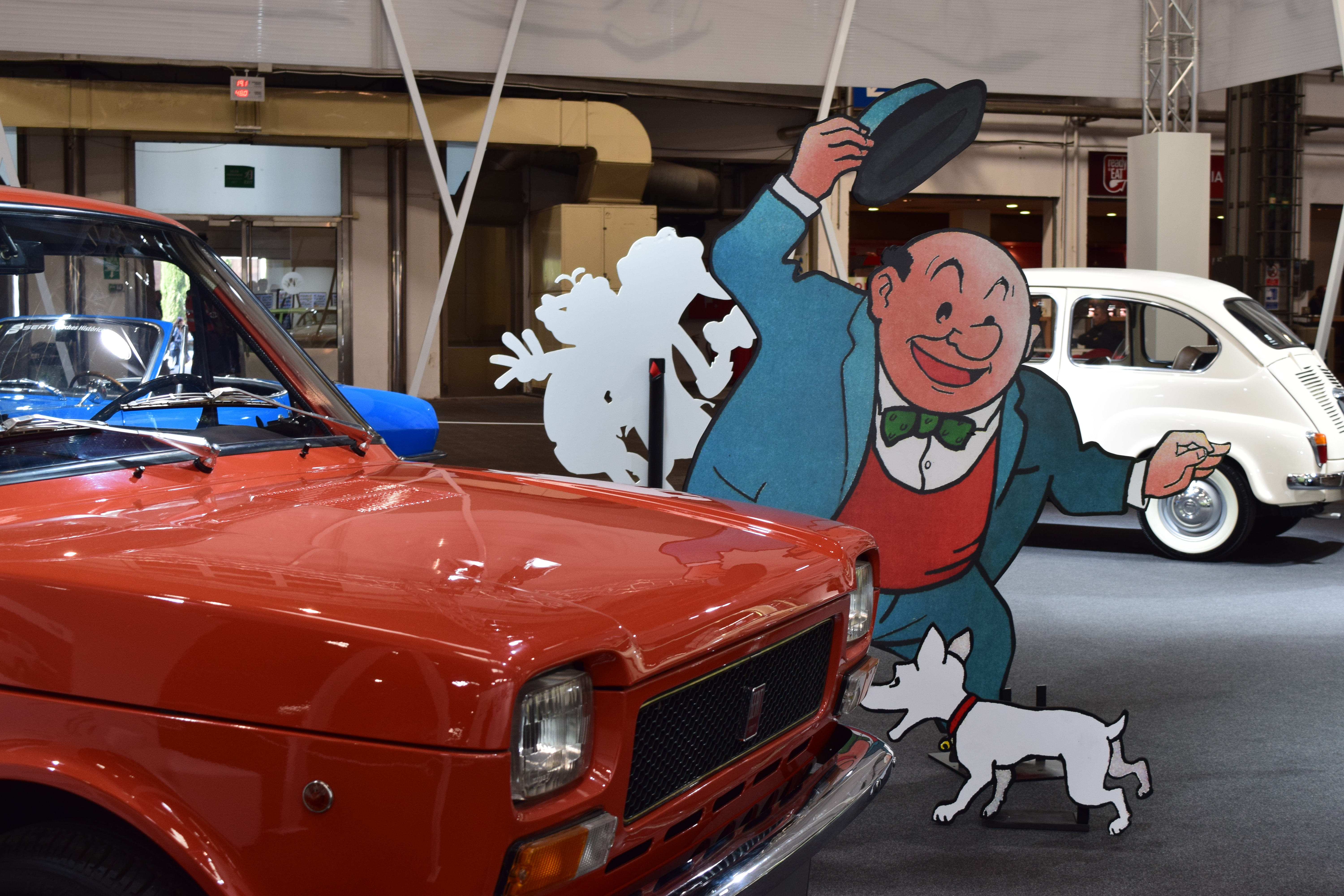 Exposició Vinyetes sobre rodes al 34è Saló Internacional del Còmic de Barcelona. Detall de la part frontal d'un Seat 127 amb el pare de la La familia Ulisses i el seu gos Tresky. El eat 127 és un model recurrent a les històries de La familia Ulisses.